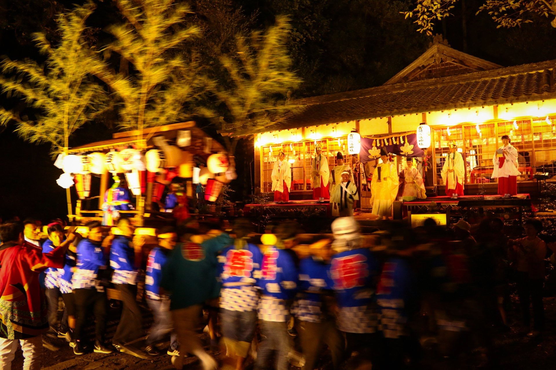 吉川八幡神社 太鼓台 宮入